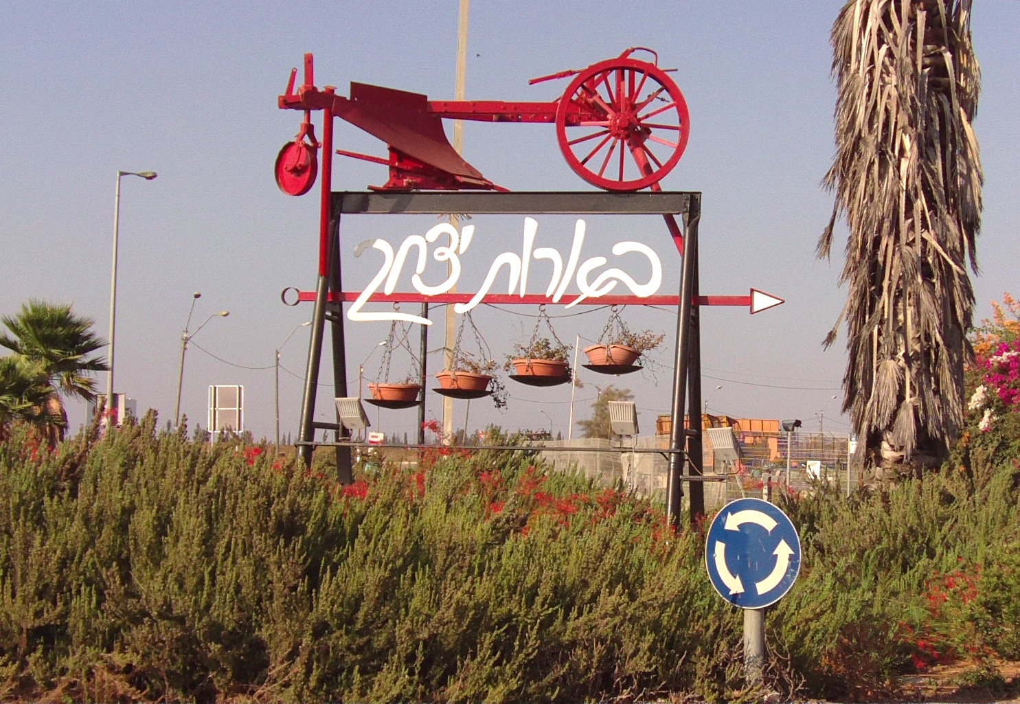 Kibutz Beerot Ytzhak הכניסה לקיבוץ